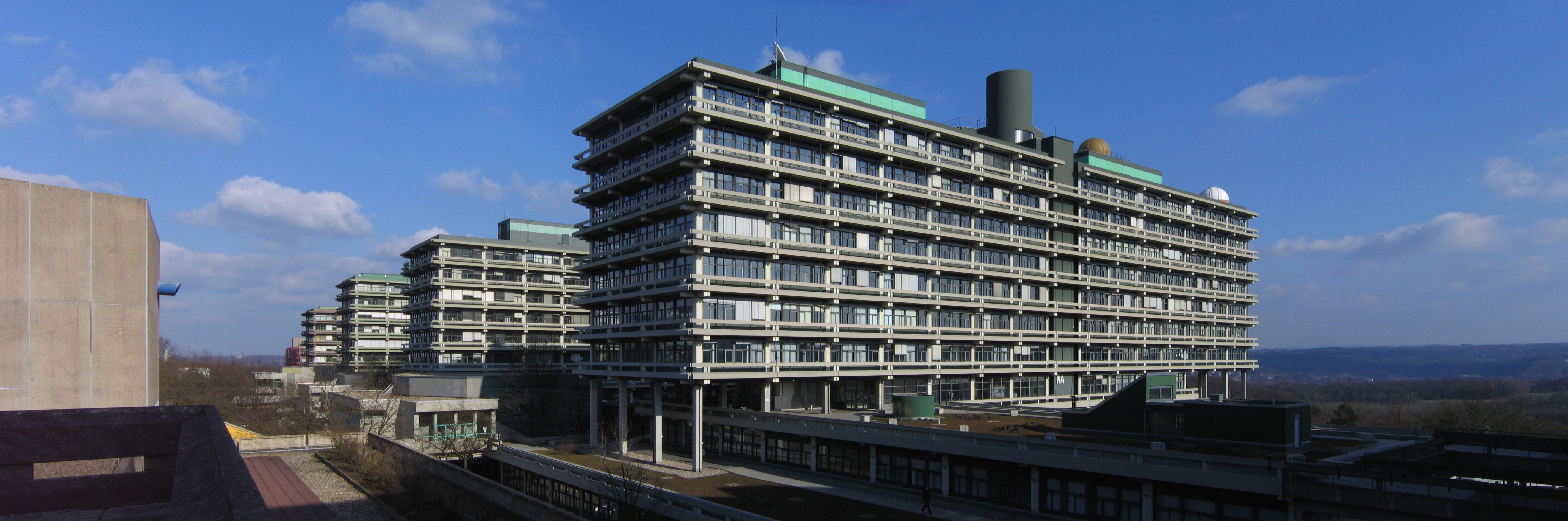 Gebäude der Universität Bochum. Panoramabild